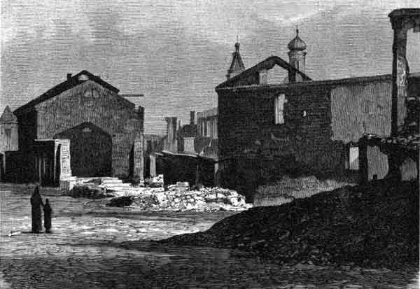 Минская улица Койдановская